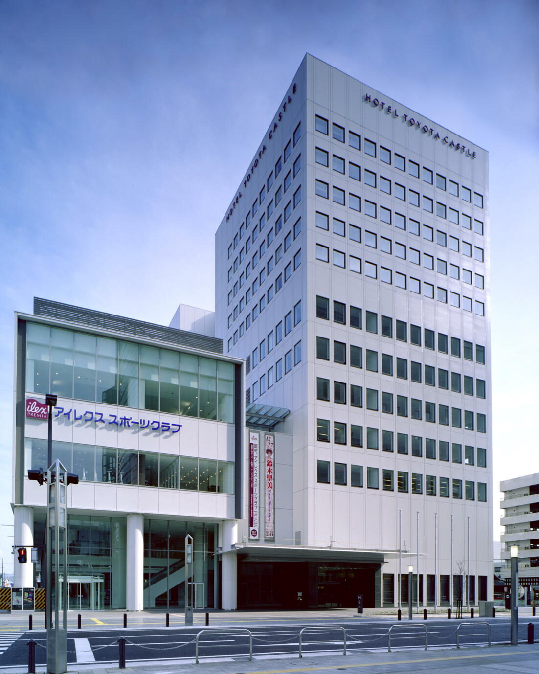 ホテルトヨタキャッスルの外観です